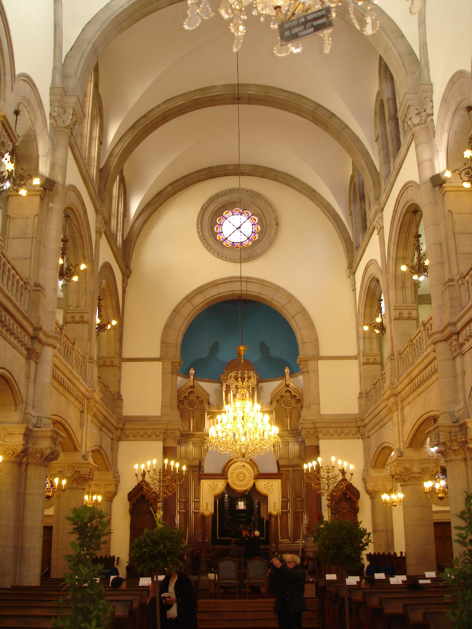 Grande Synagogue de Lyon- Vue intérieure